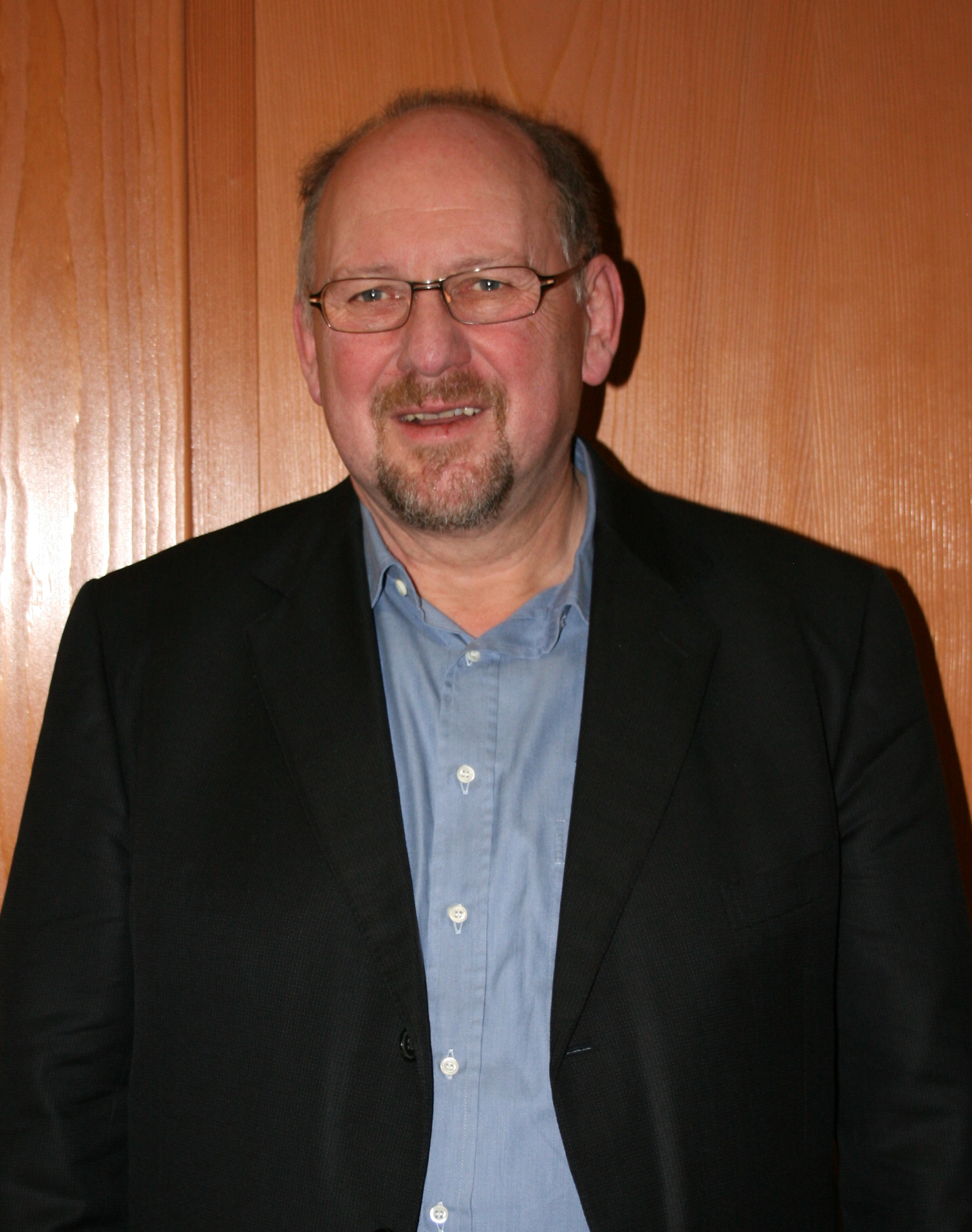 Richard Drautz beim Neujahrsempfang der Hohenloher FDP in Bretzfeld-Adolzfurt